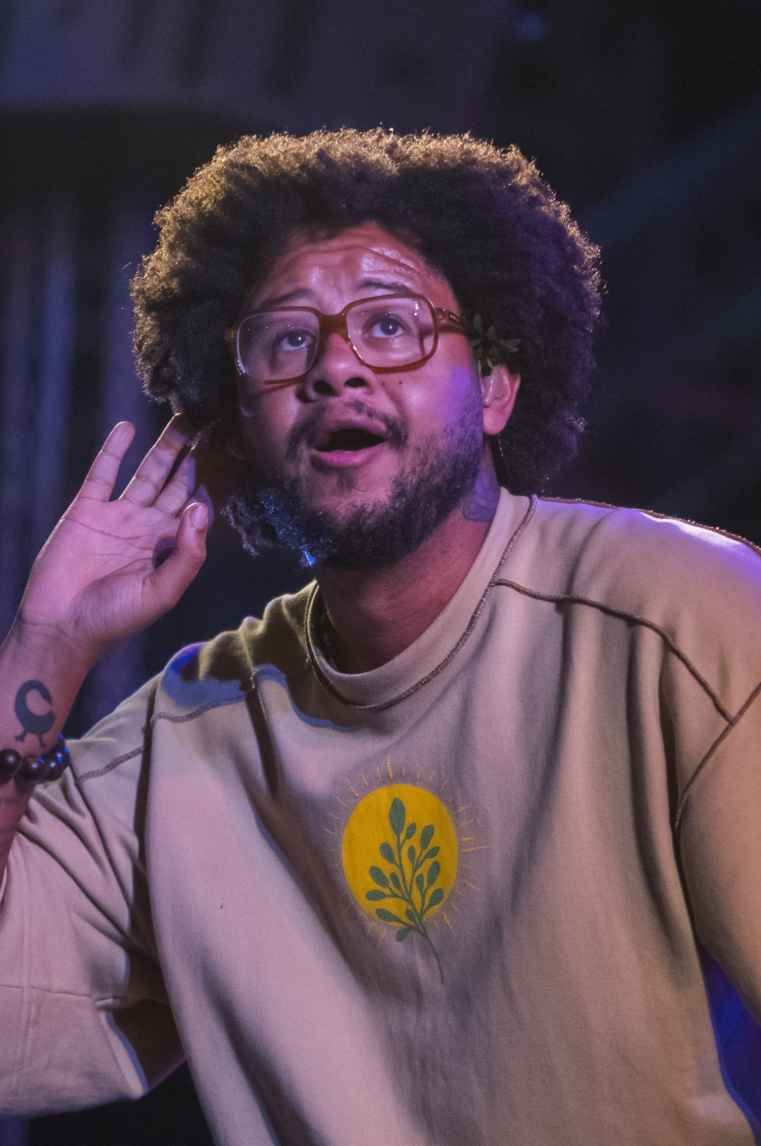 A Esplanada do Mineirão recebe a oitava edição do festival, que reúne quase 40 atrações. Em clima de pré-carnaval, a festa celebra 10 de anos de história do S.E.N.S.A.C.I.O.N.A.L! Emicida convida Pabllo Vittar.